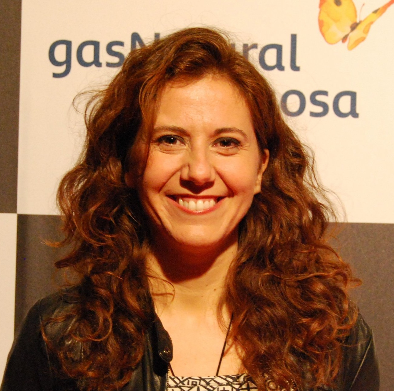 Fátima Baeza actriz española